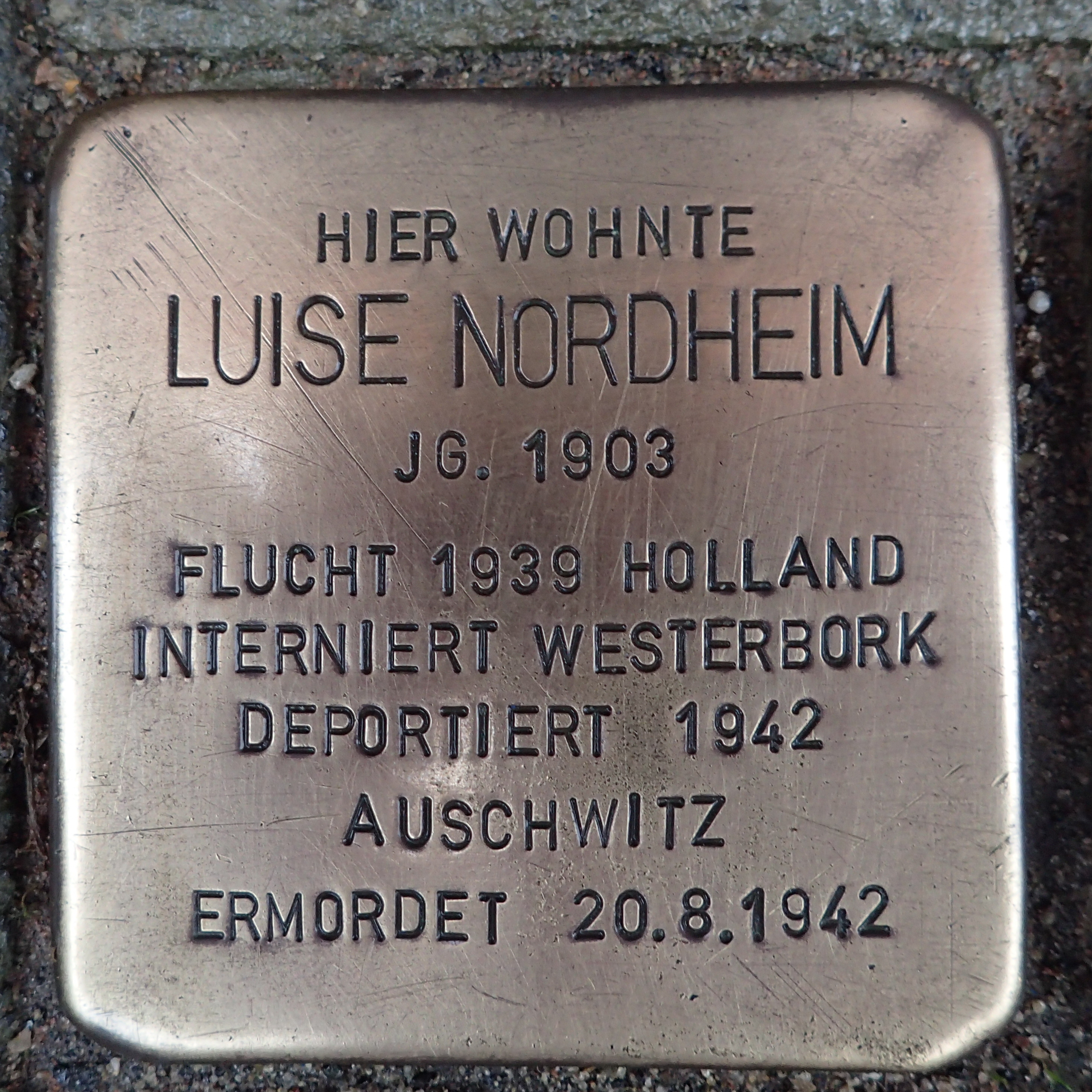 Stolperstein Geldern Westwall 6 Luise Nordheim